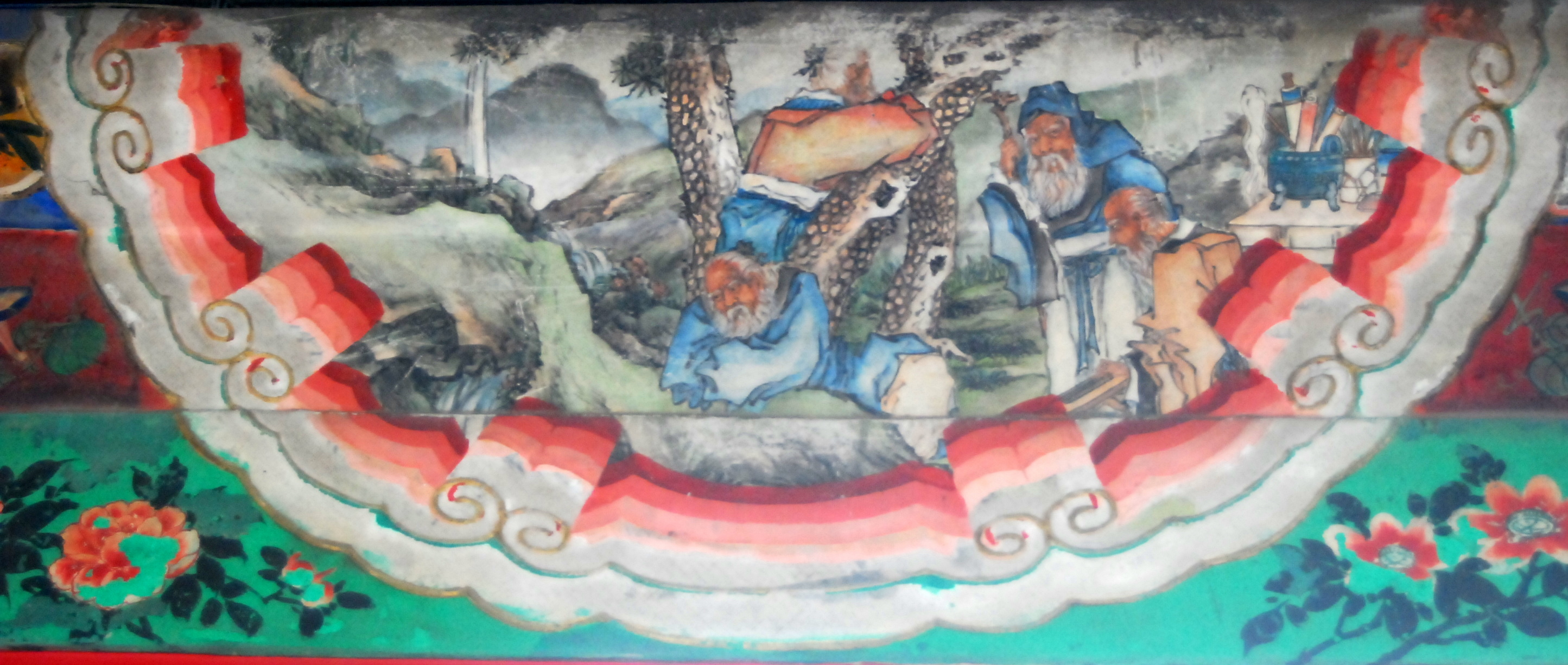 颐和园长廊上的彩绘：商山四皓